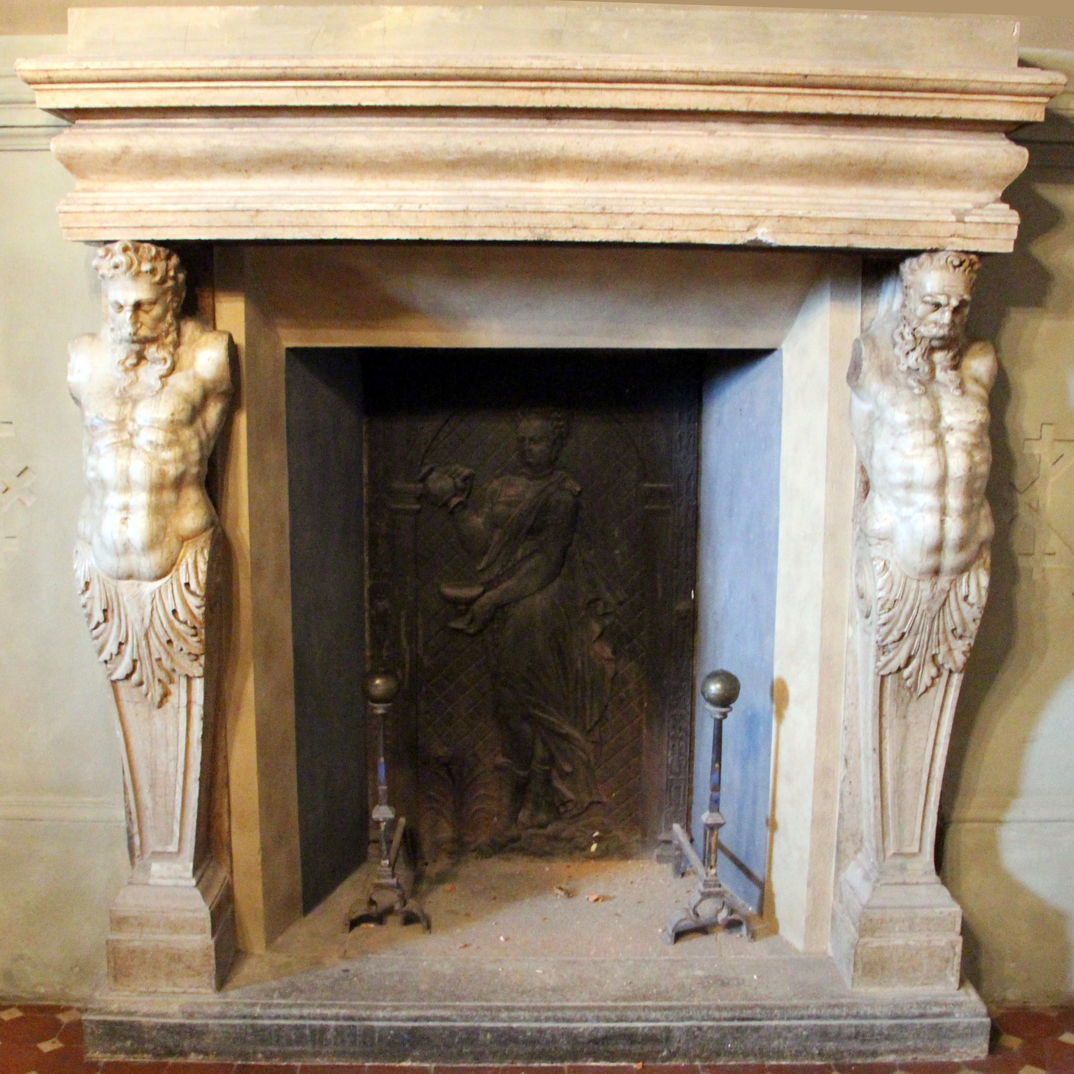 Villa medicea di Poggio a Caiano - MIBAC The making of this document was supported by Wikimedia CH. (Submit your project!) For all the files concerned, please see the category Supported by Wikimedia CH. This is a photo of a monument which is part of cultural heritage of Italy.